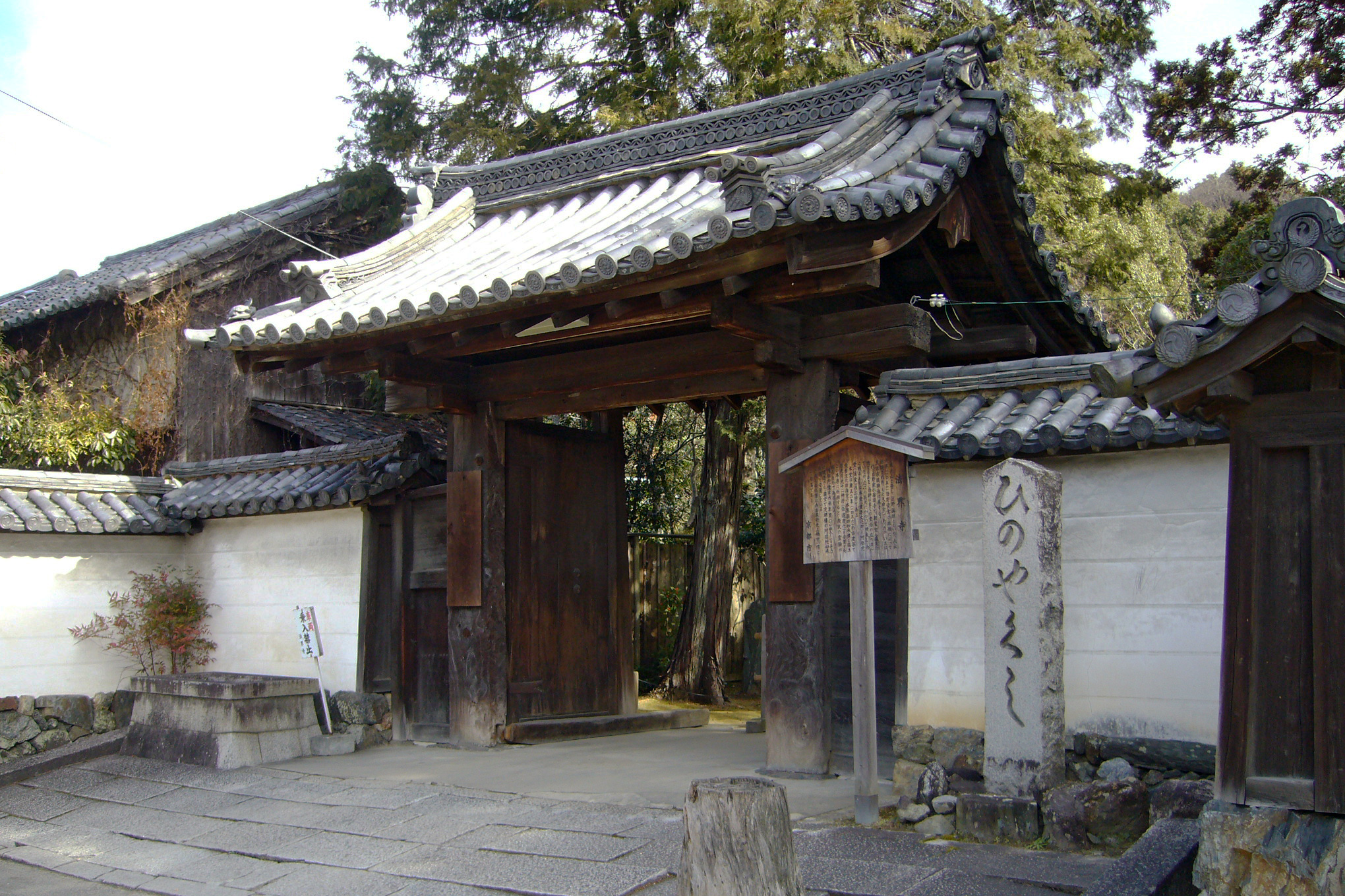 Hokaiji in Kyoto, Japan